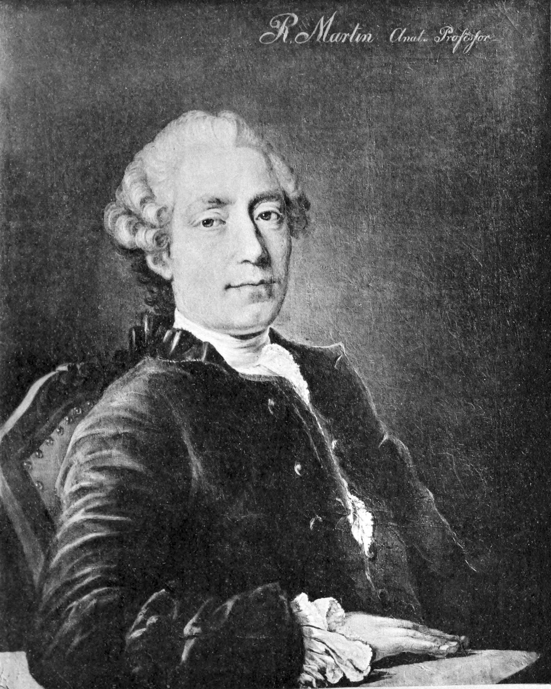 Roland Martin (1726-1788). Medelålders man, bröstbild, fas t. v., sitter på stol med förgylldt skulpte-radt rödklädt ryggstöd, stöder högra armen på ett bord. Han har blå ögon, mörka ögonbryn, hvit uppstruken piskperuk med två kanonlockar vid örat, det svarta nack-bandet på högra axeln. Hvit lindad halsduk, spetskrås, spetsmanschetter, mörkviolett väst med klädda knappar, knäppt nedtill, blå kraglös sammetsrock med klädda knappar, oknäppt, stora uppknäppta ärmuppslag. Bakgrund mörk oliv, öfverst t. v. står: R. Martin Anat. Professor. Olja på duk, 72x5872 ctm., af P. Krafft d. ä. Karolinska institutet, gåfva af Martins söner (Sacklén: Läkarehistoria 1: 697)